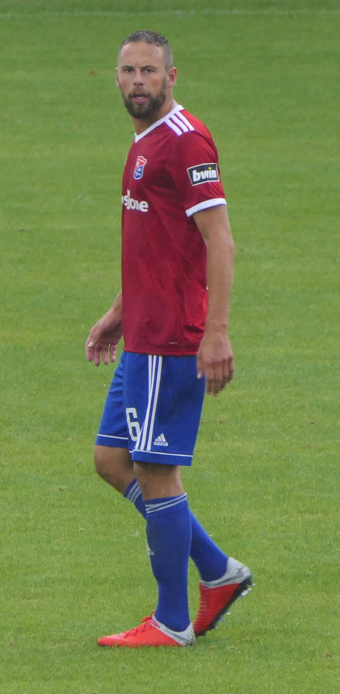 Der Fussballprofi Marc Endres im Trikot der SpVgg Unterhaching beim Heimspiel gegen Eintracht Braunschweig am 01.09.2018.